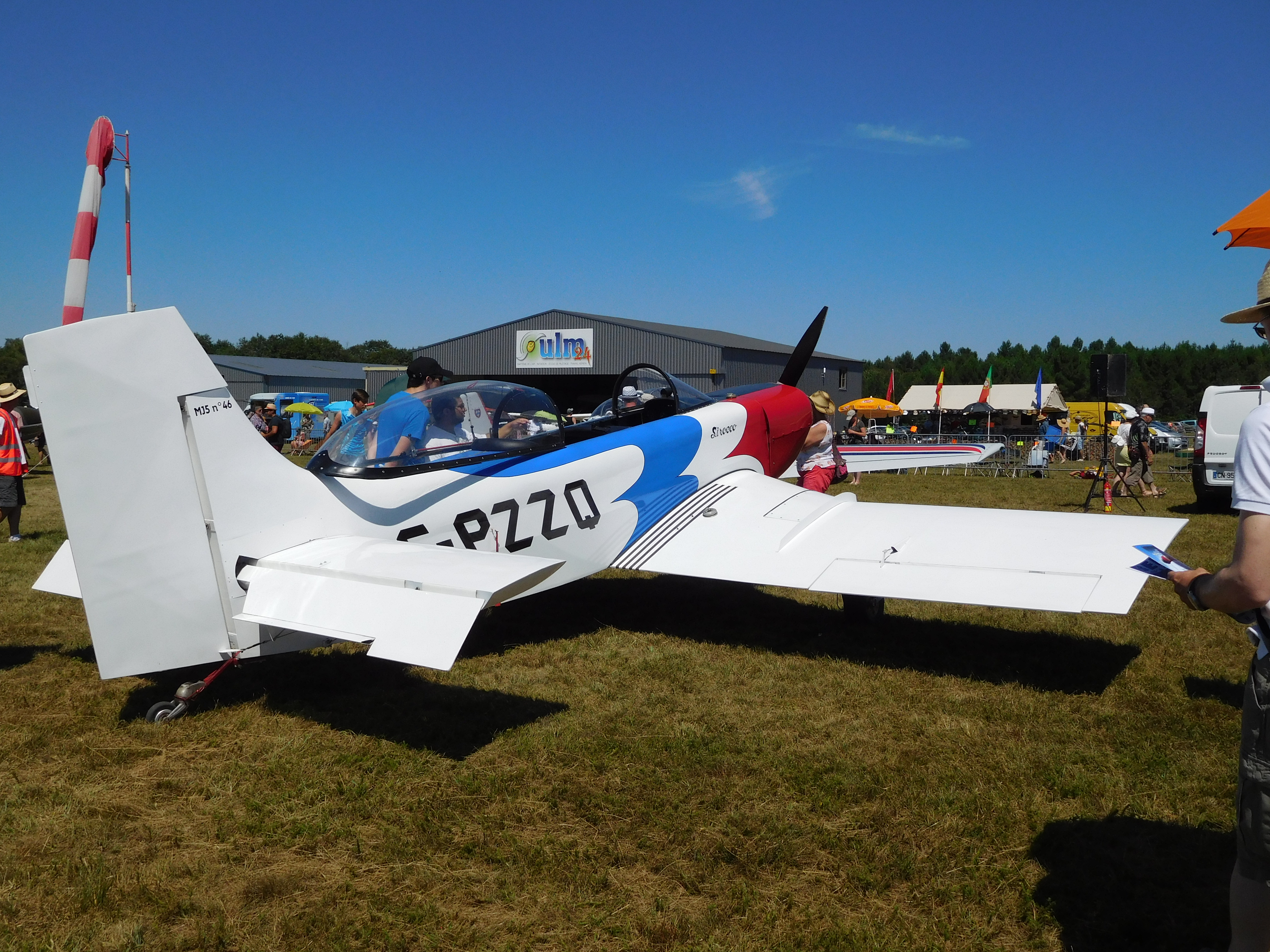 Marcel Jurca MJ-5 Sirocco, F-PZZQ, N° 46. Avion de voltige, en bois et toile.